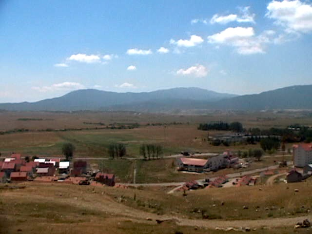 Gacko